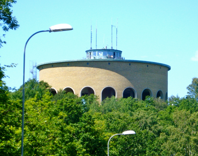 Vattetornet Guldhedstornet i Guldheden i Göteborg